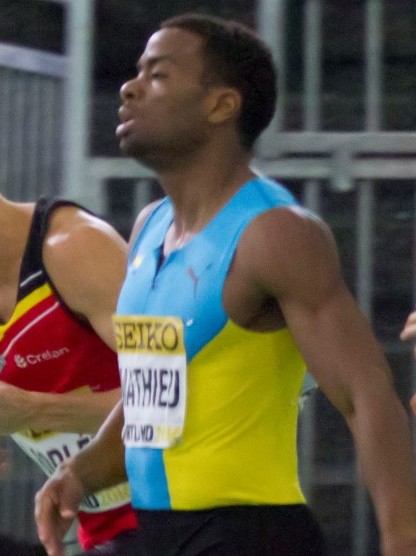 375 reeksen 4x400 dylan jonathan borlee